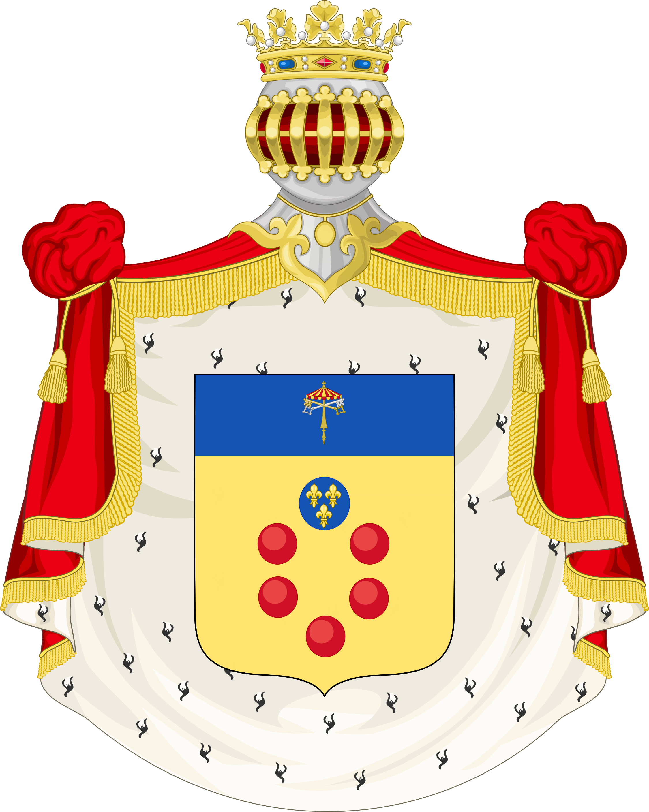 Stemma dei Medici di Ottajano.